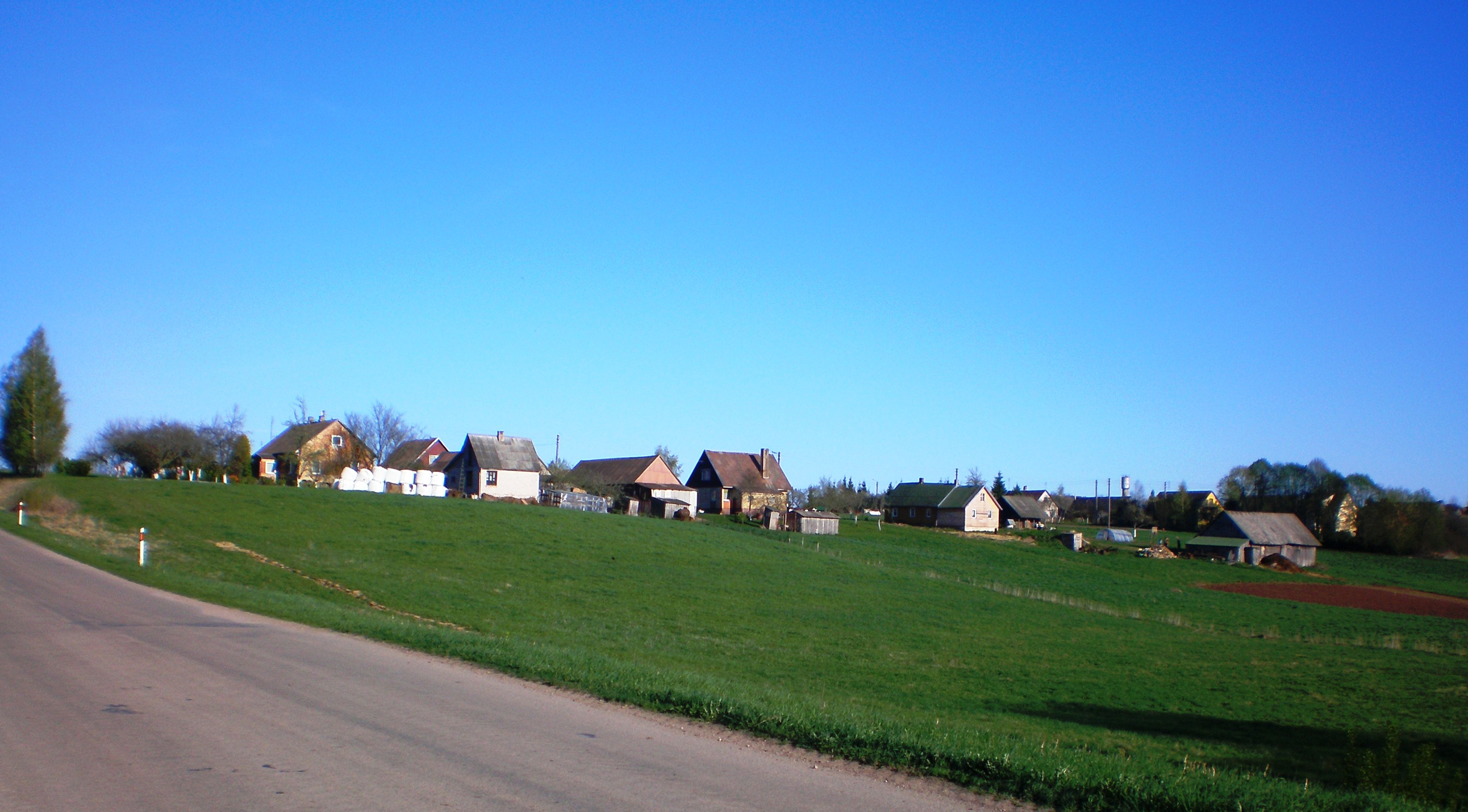 Barkūniškis, Krakių sen., Kėdainių raj.